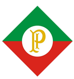 Escudo do Palestra Itália MG em 1921